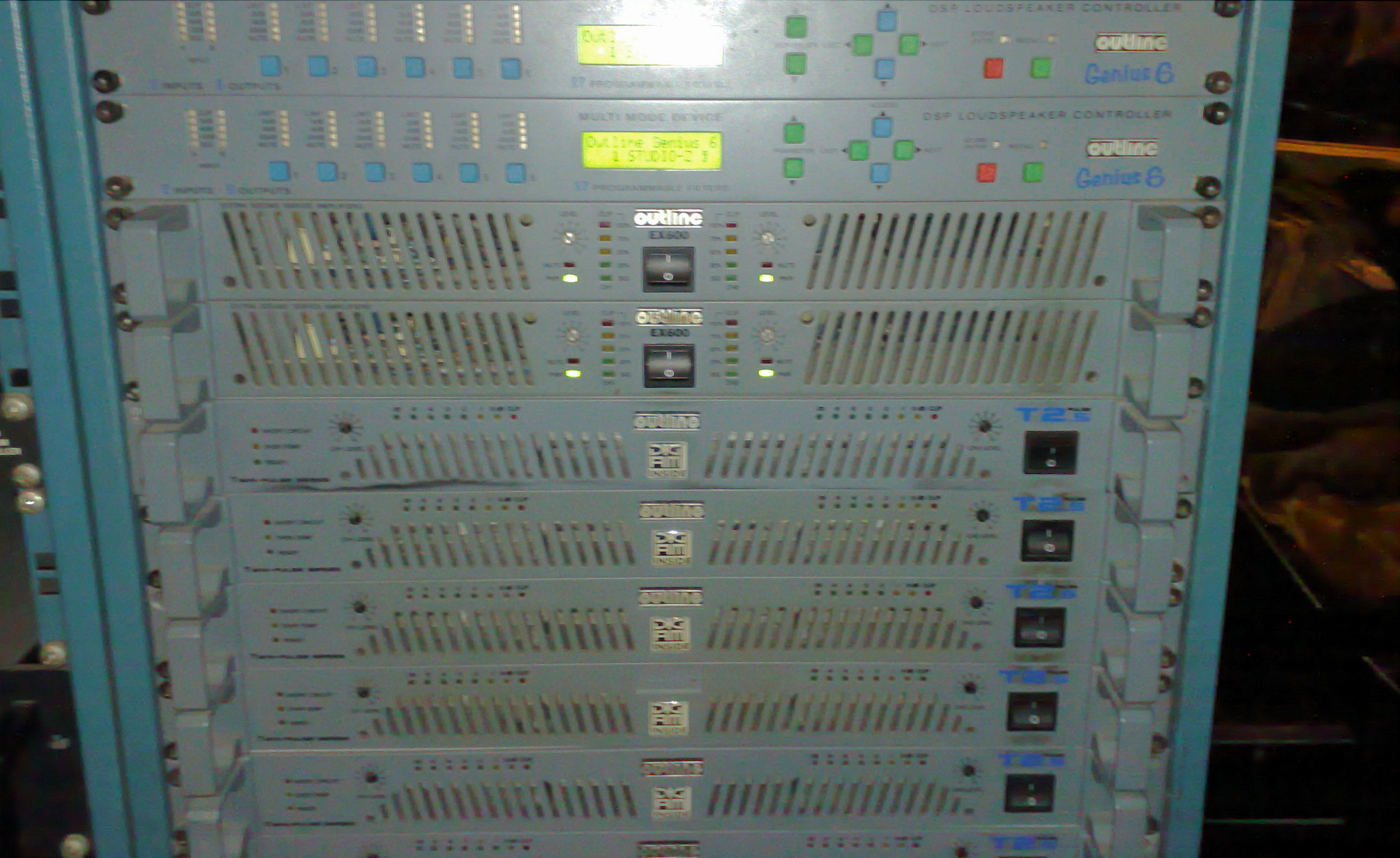 Rack amplificatori finali di potenza della Outline